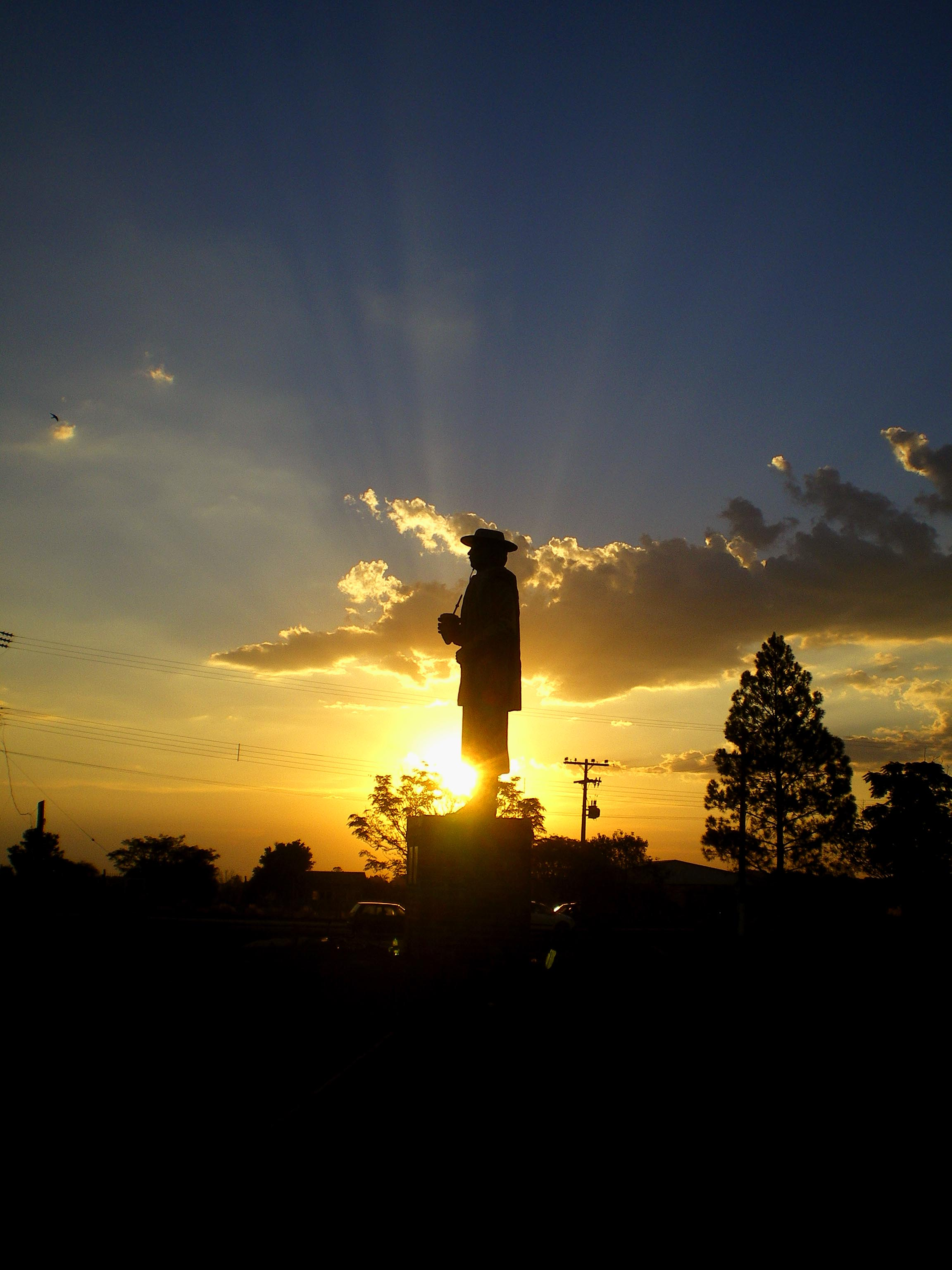 Final de tarde no Monumento ao pajador Jayme Caetano Braun. São Luiz Gonzaga-Missões-RS-Brasil. Concreto armado, seis metros de altura.